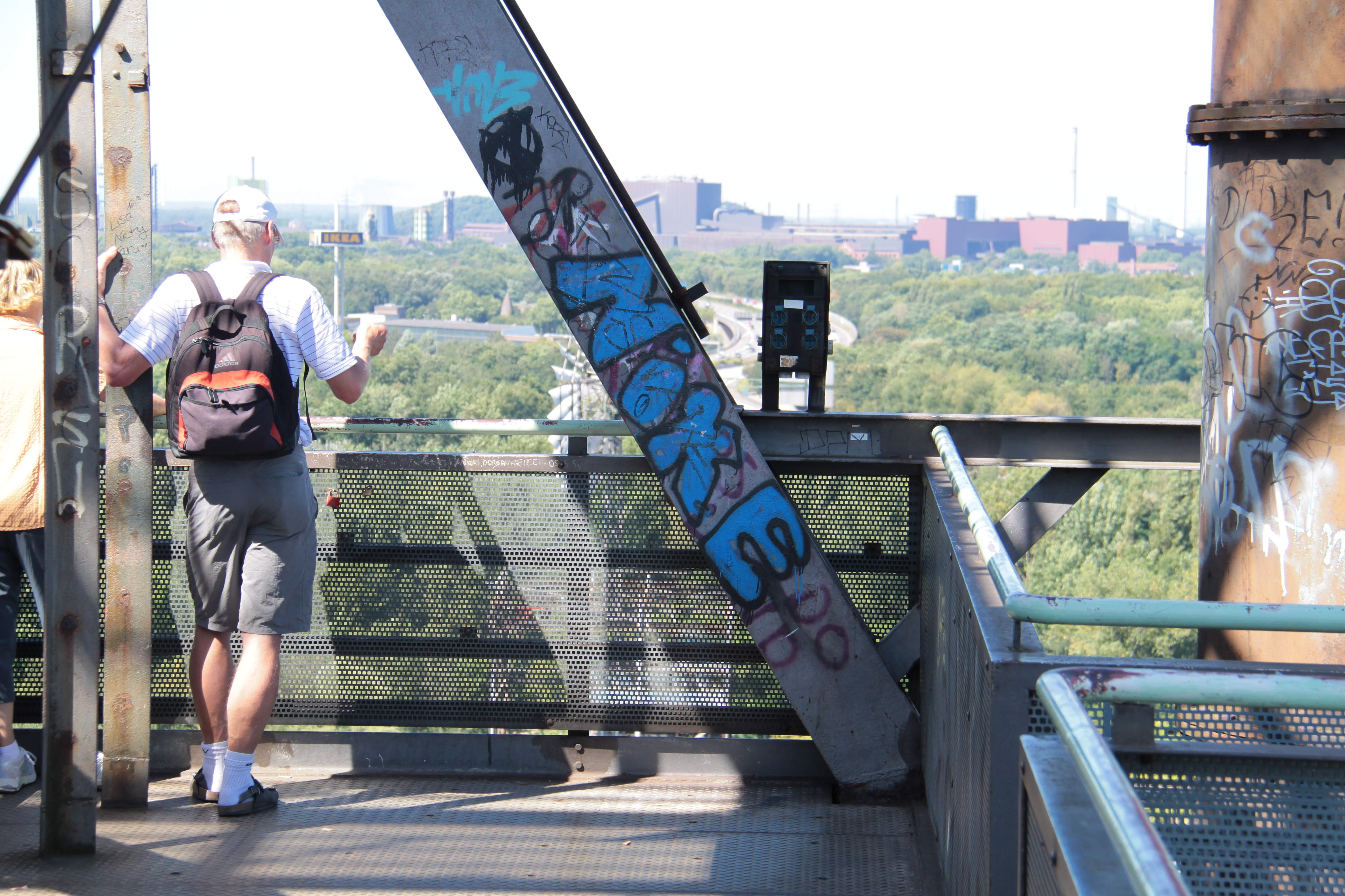 Impressionen Landschaftspark Duisburg-Nord